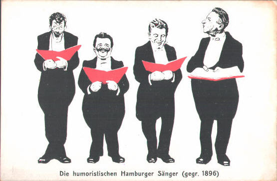 Wilhelm Wolffs Gruppe "Hamburger Sänger"